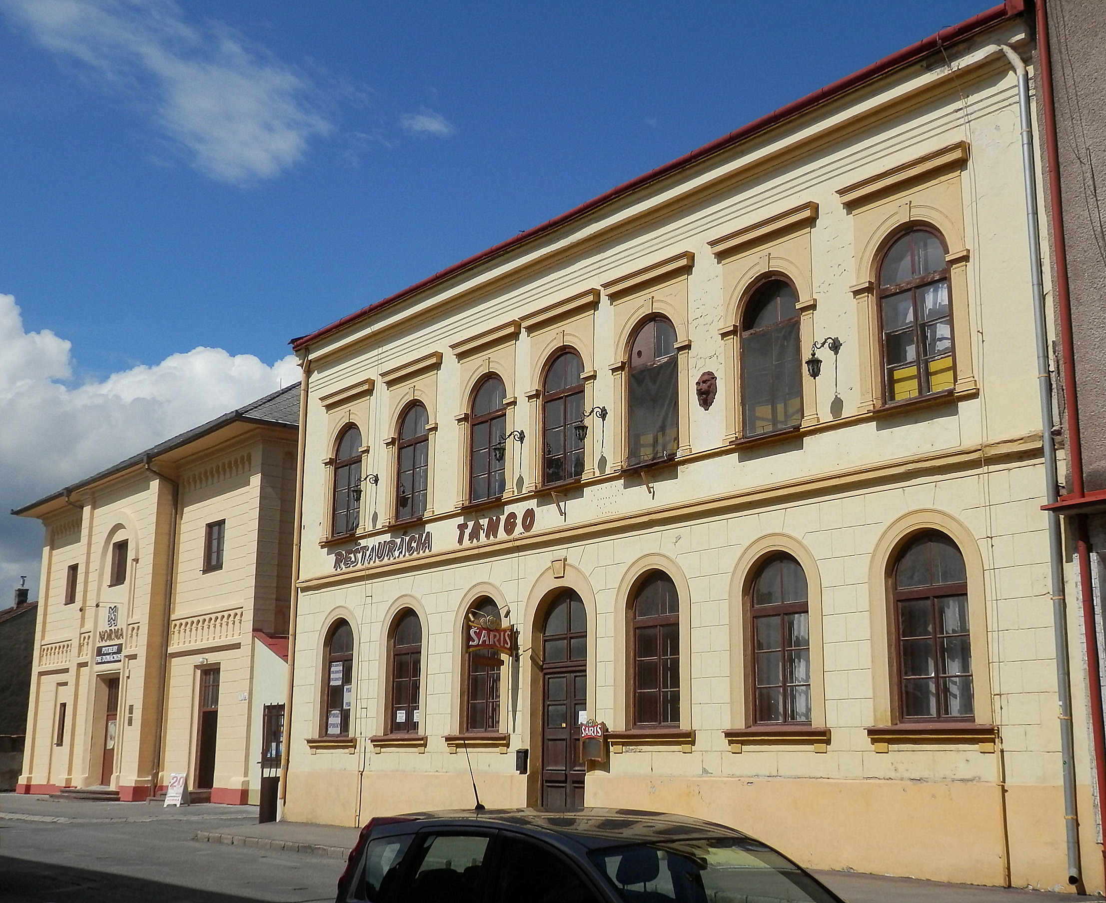 Vpravo historická budova "Židovská neologická ľudová škola." Konštantínova ulica. č.5 Vľavo "Židovská neologická synagóga." Konštantínova ulica. č.7 Mesto Prešov.